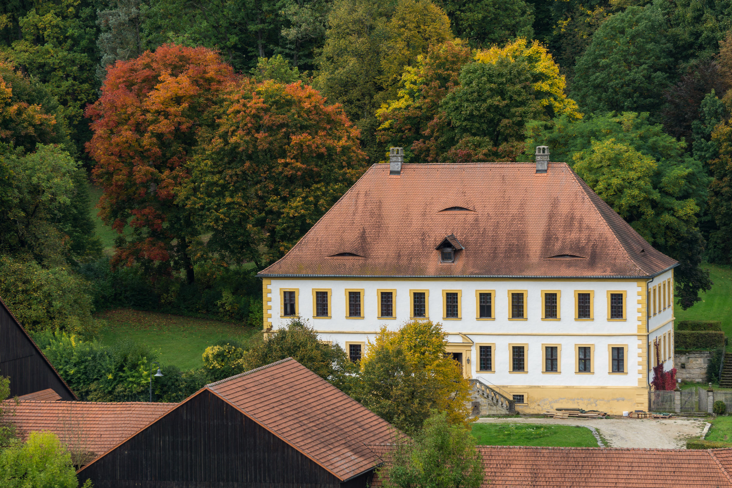 Ansicht Schloss Weißenbrunn vom alten Steinbruch